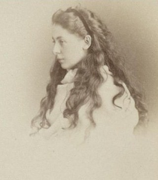 Александра Васильевна Жуковская, в замужестве баронесса Верман (1842—1899)